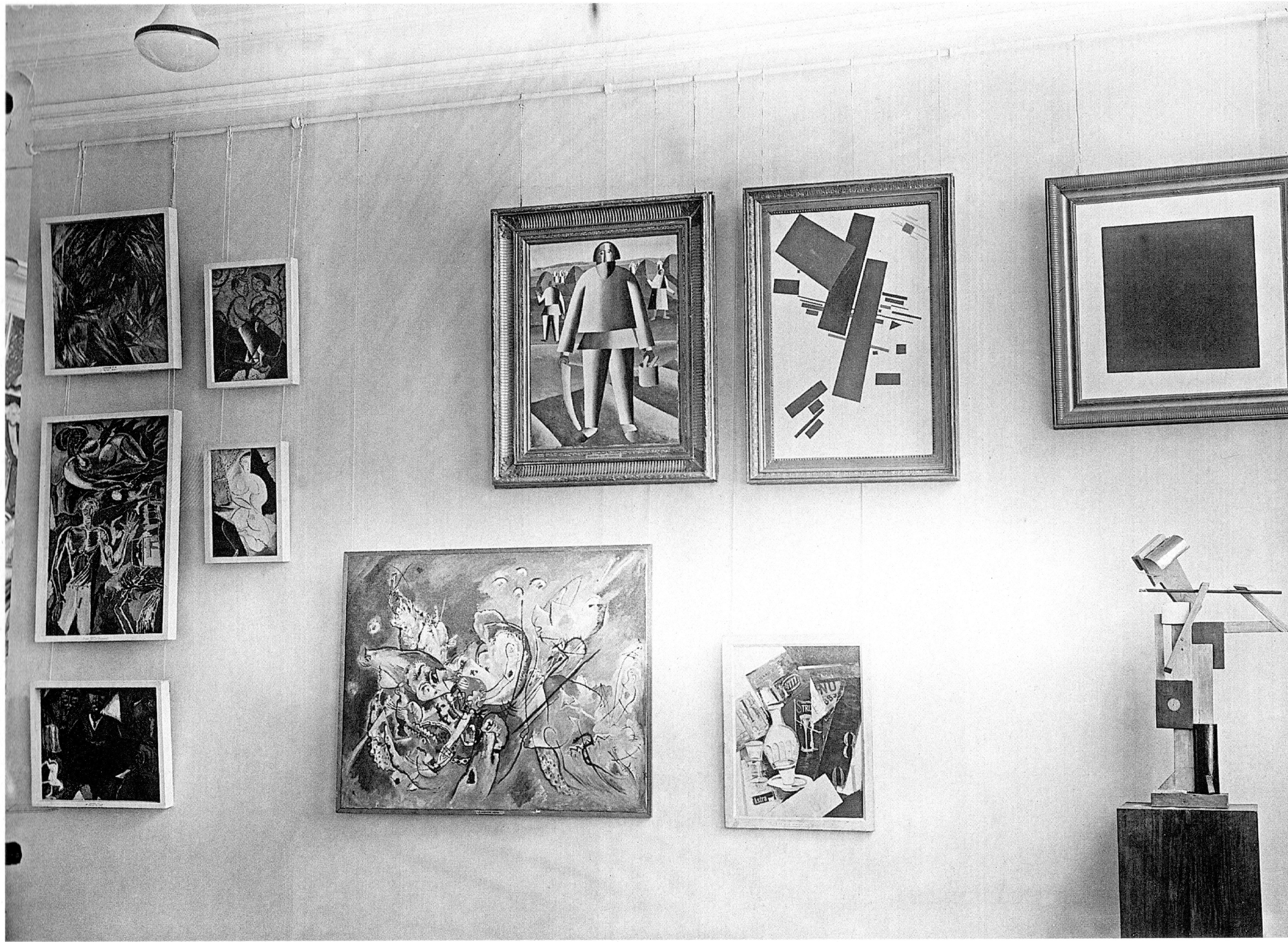 Экспозиция новейших течений Государственной Третьяковской галери. Май 1929 - август 1930. Отпечаток фотографии находится в Научно-исследовательском отделе кинофотоматериалов Государственной Третьяковской галереи.